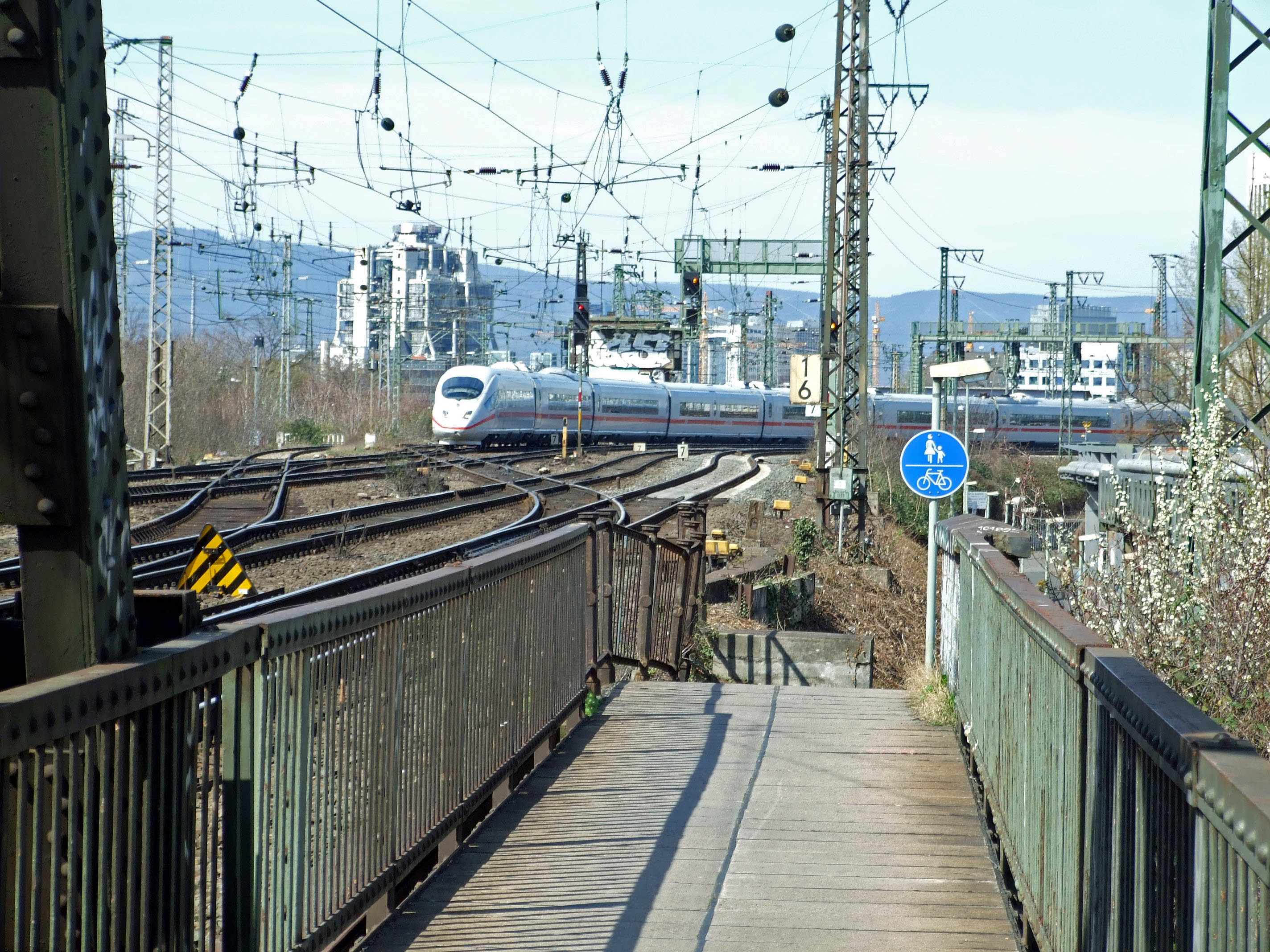 ICE 3-Zug bei Ausfahrt aus dem Hauptbahnhof-Gleisvorfeld auf die Main-Neckar-Bruecke